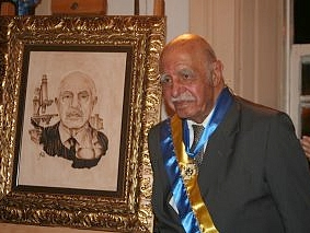 Metry Bacila recebe homenagem do Instituto Histórico e Geográfico de Palmeira, em 2009.